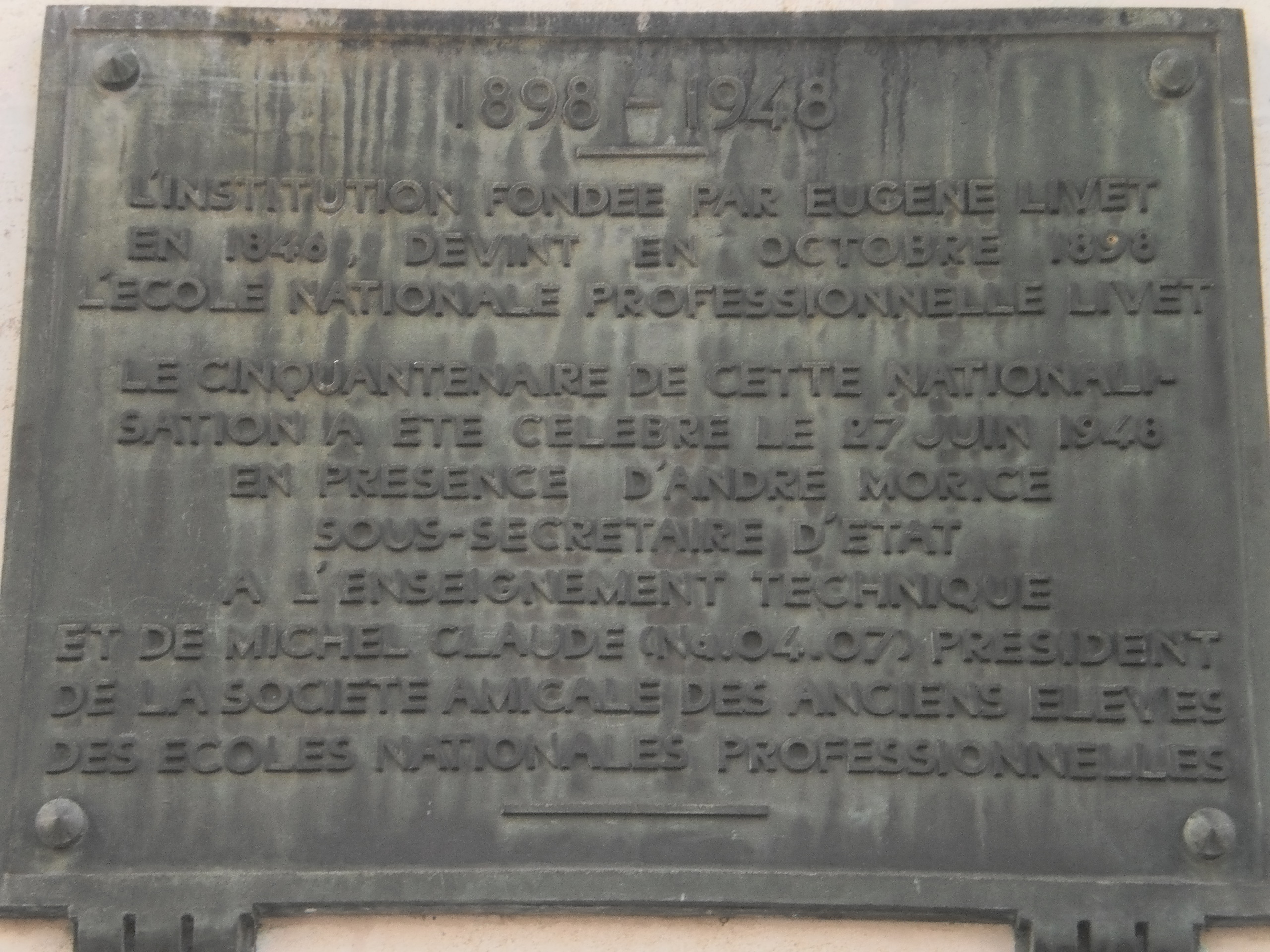 Plaque commémorative du lycée Eugène-Livet (Nantes, France), rue Dufour